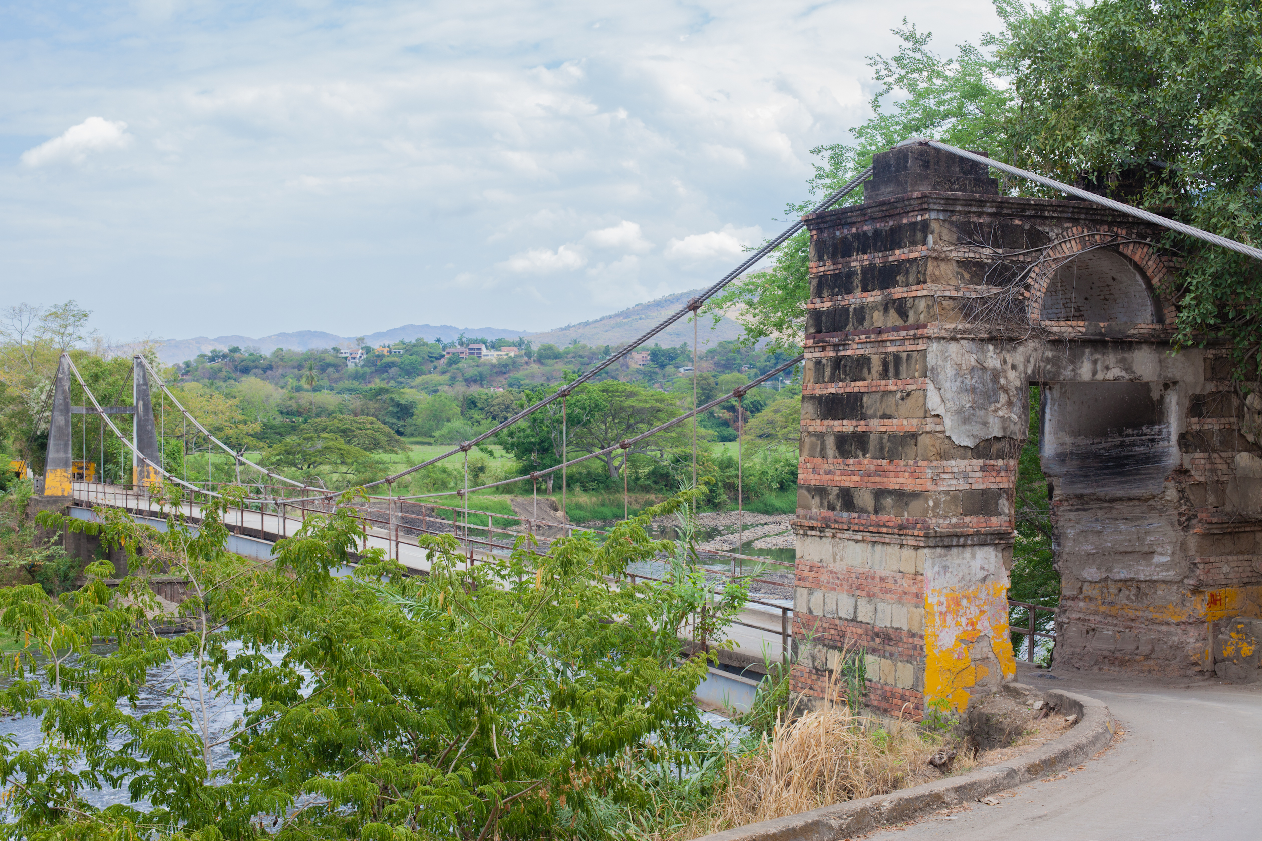 Sanatorio Agua de Dios. Puente de los Suspiros